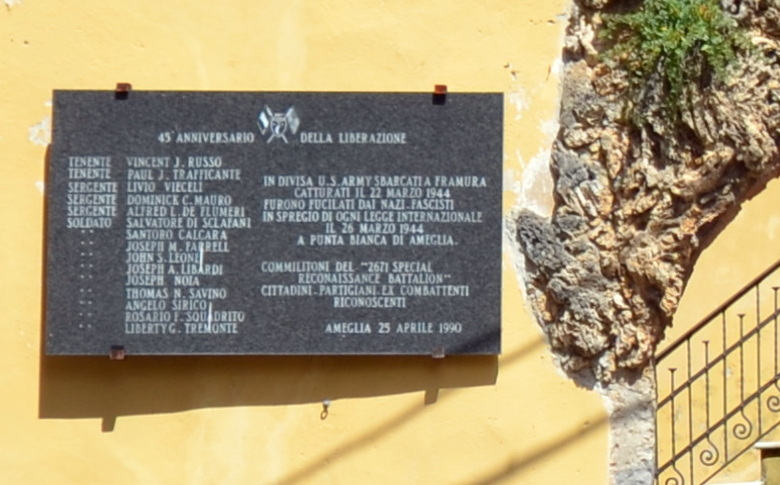 Particolare della targa di piazza della Libertà, Ameglia, Liguria, Italia